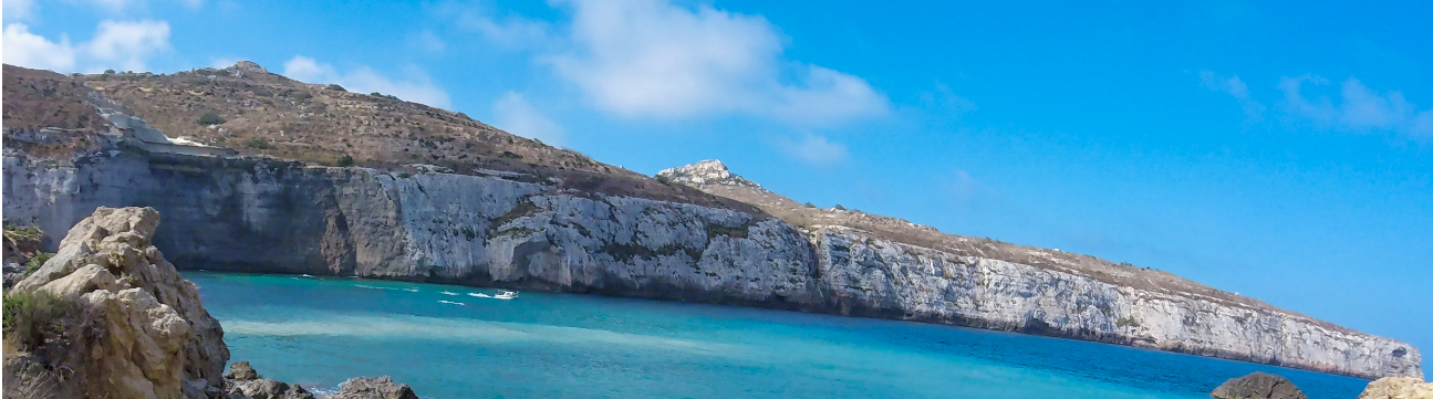 Klif.